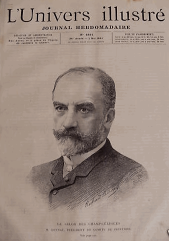 Portrait du peintre Léon Bonnat par Richard Paraire.